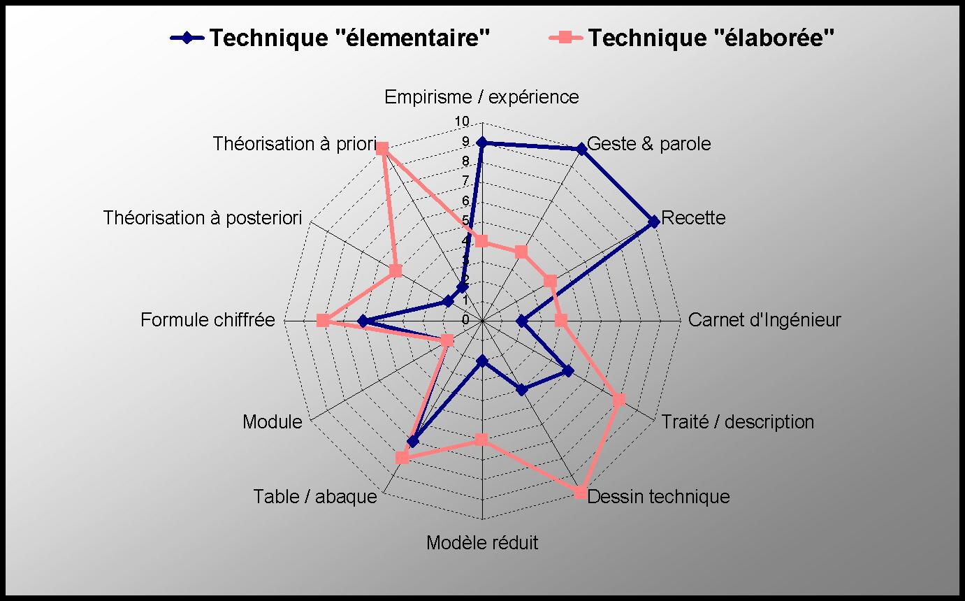 Description : schéma de synthèse pour l'évaluation des vecteurs de la connaissance technique en fonction des spécialités Source : image personnelle Statut : Catégorie:Schémas